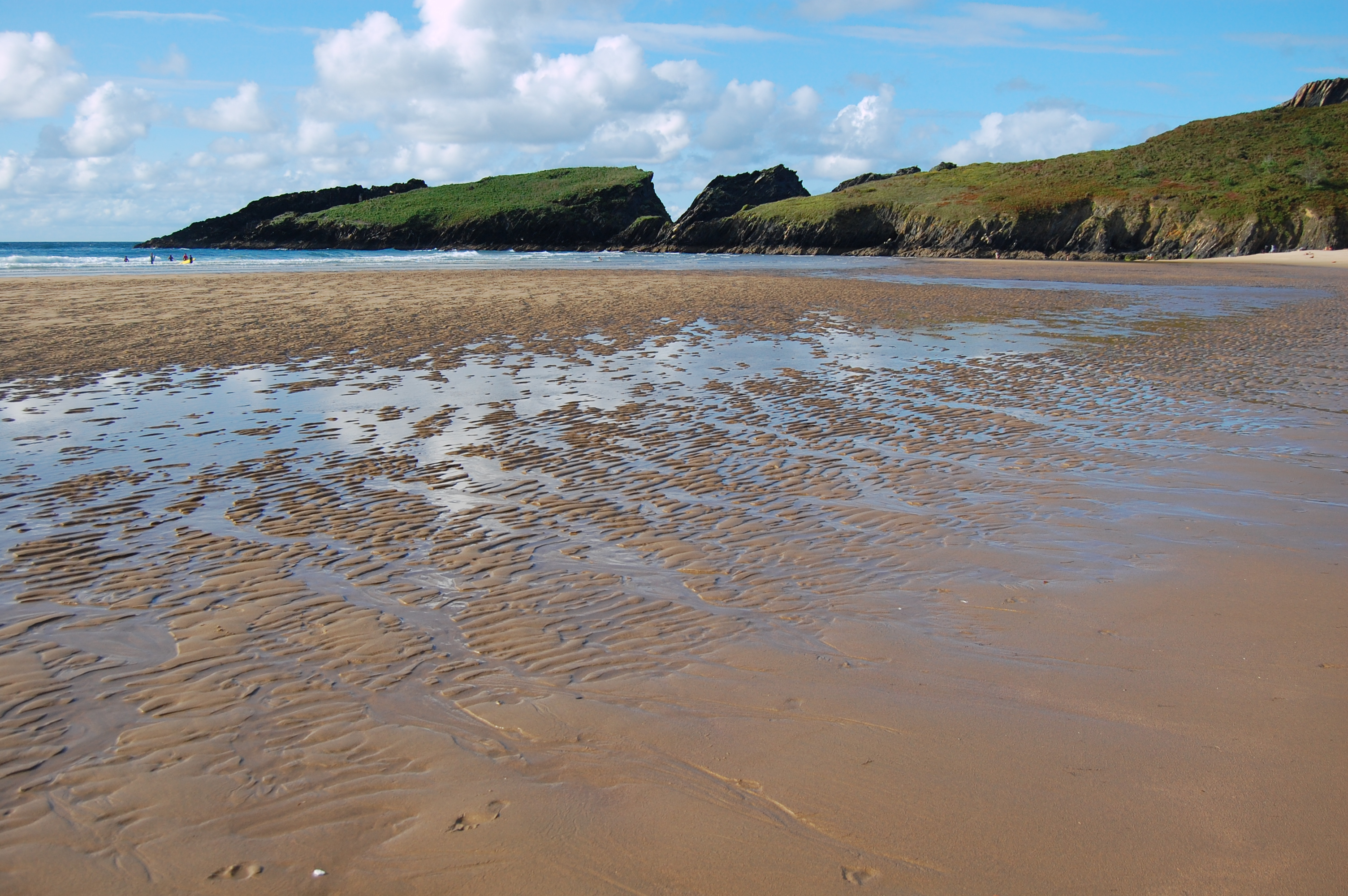 Praia de Esteiro entre as parroquias de Mogor (Mañón) e Loiba (Ortigueira), pertencente ó Lugar de Importancia Comunitaria Estaca de Bares This is a photography of a Special Area of Conservation in Spain with the ID: ES1110010. Natura2000 entry, EEA entry